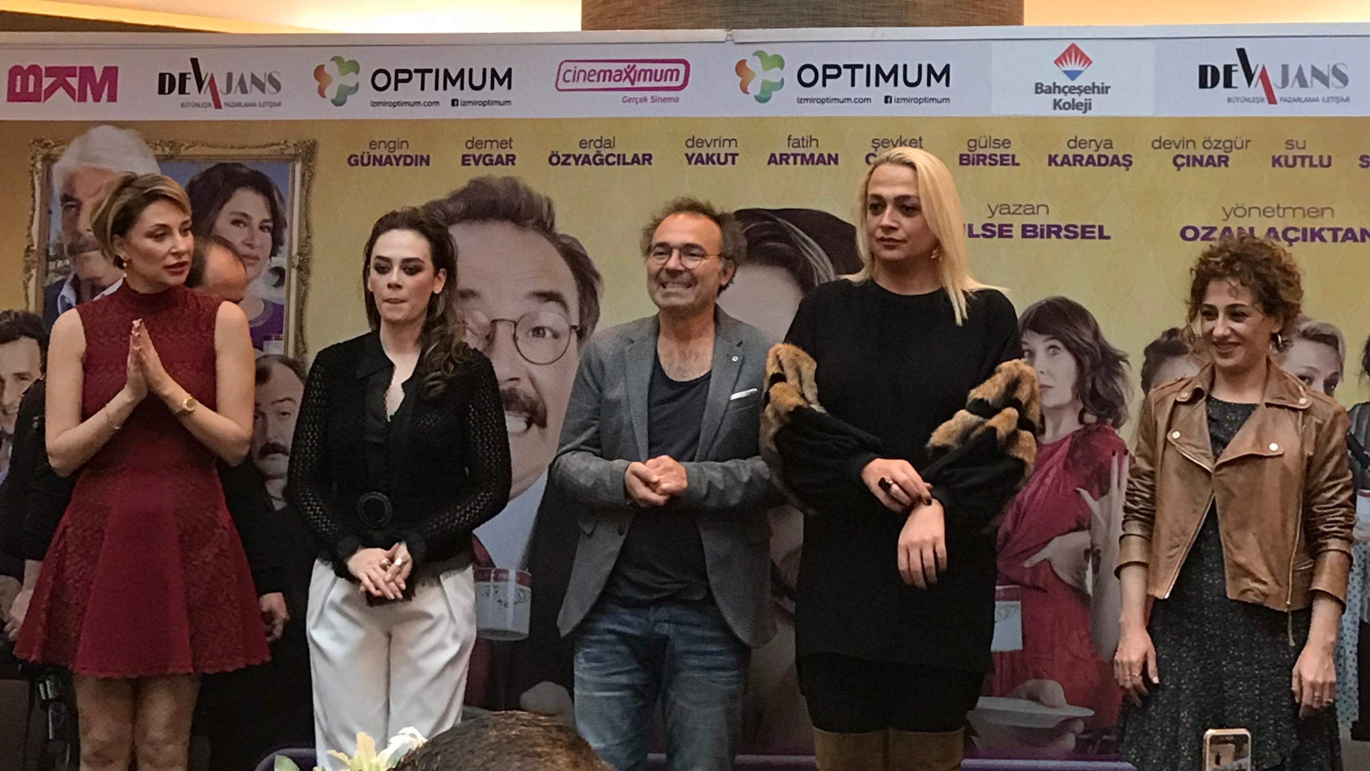 Aile Arasında filminin oyuncuları İzmir galasında.